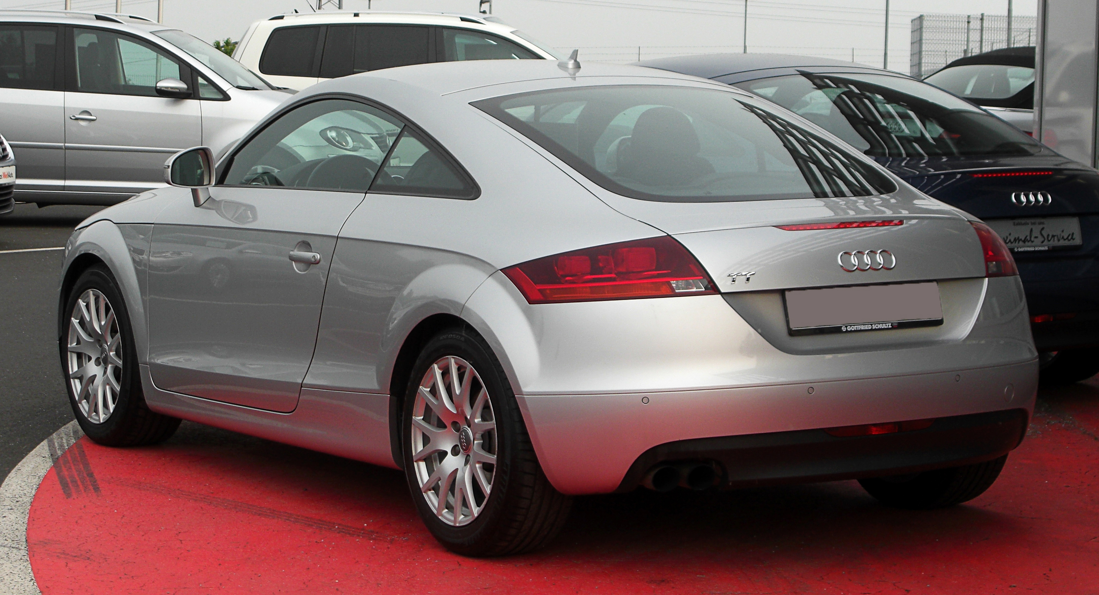 Audi TT Coupé 2.0 TFSI (8J)